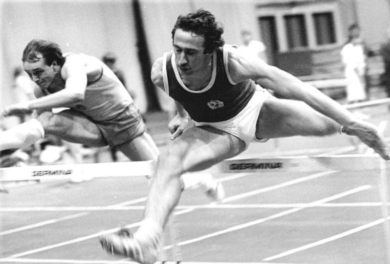 Thomas Munkelt ADN-ZB Weisflog 20.2.83 Bez. Cottbus: DDR-Hallenmeisterschaften der Leichtathleten in Senftenberg- Den Titel über 60-m-Hürden gewann Thomas Munkelt (SC DHFK Leipzig) in 7,63 s.